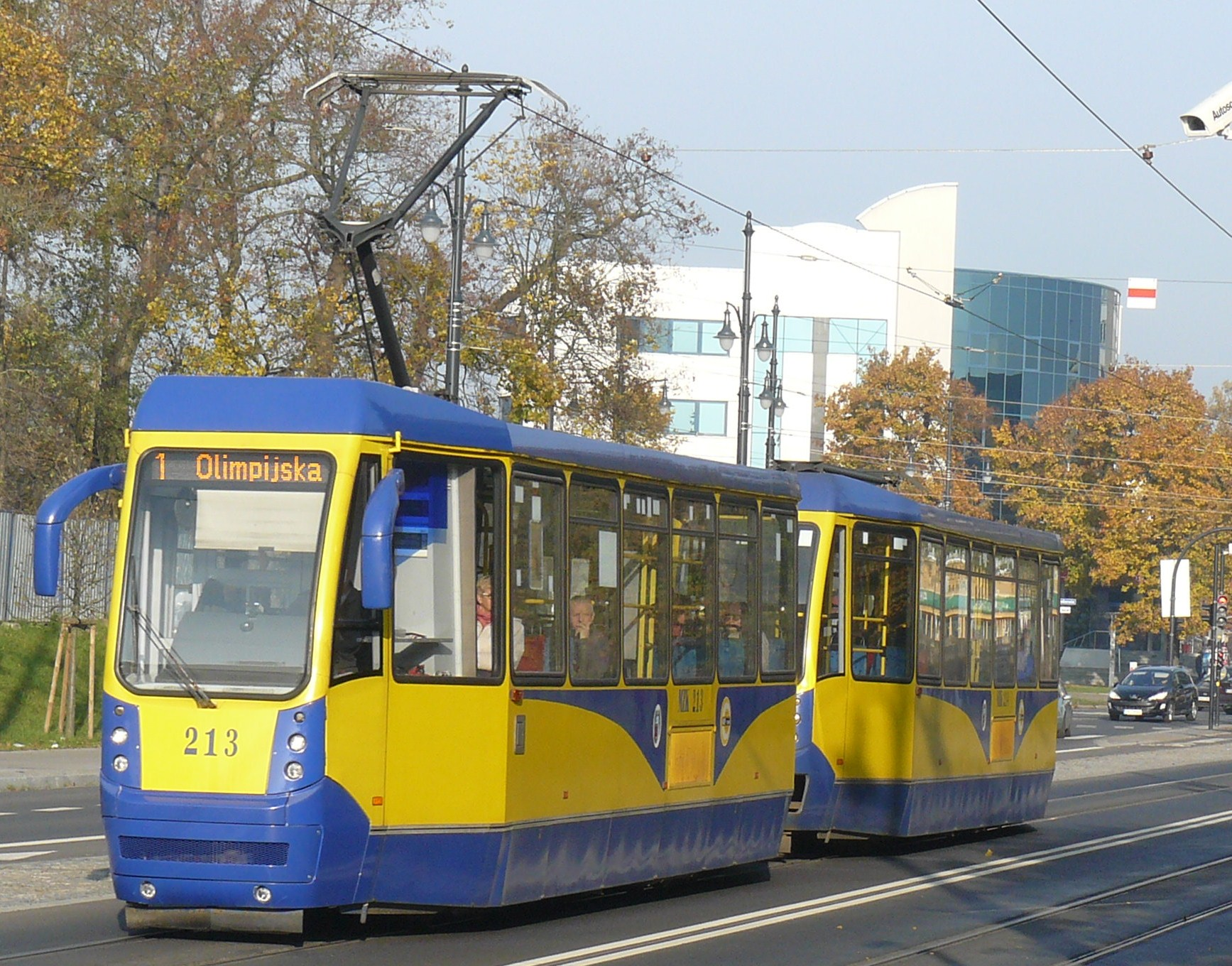 Toruń, tramwaj. Ul. Odrodzenia.